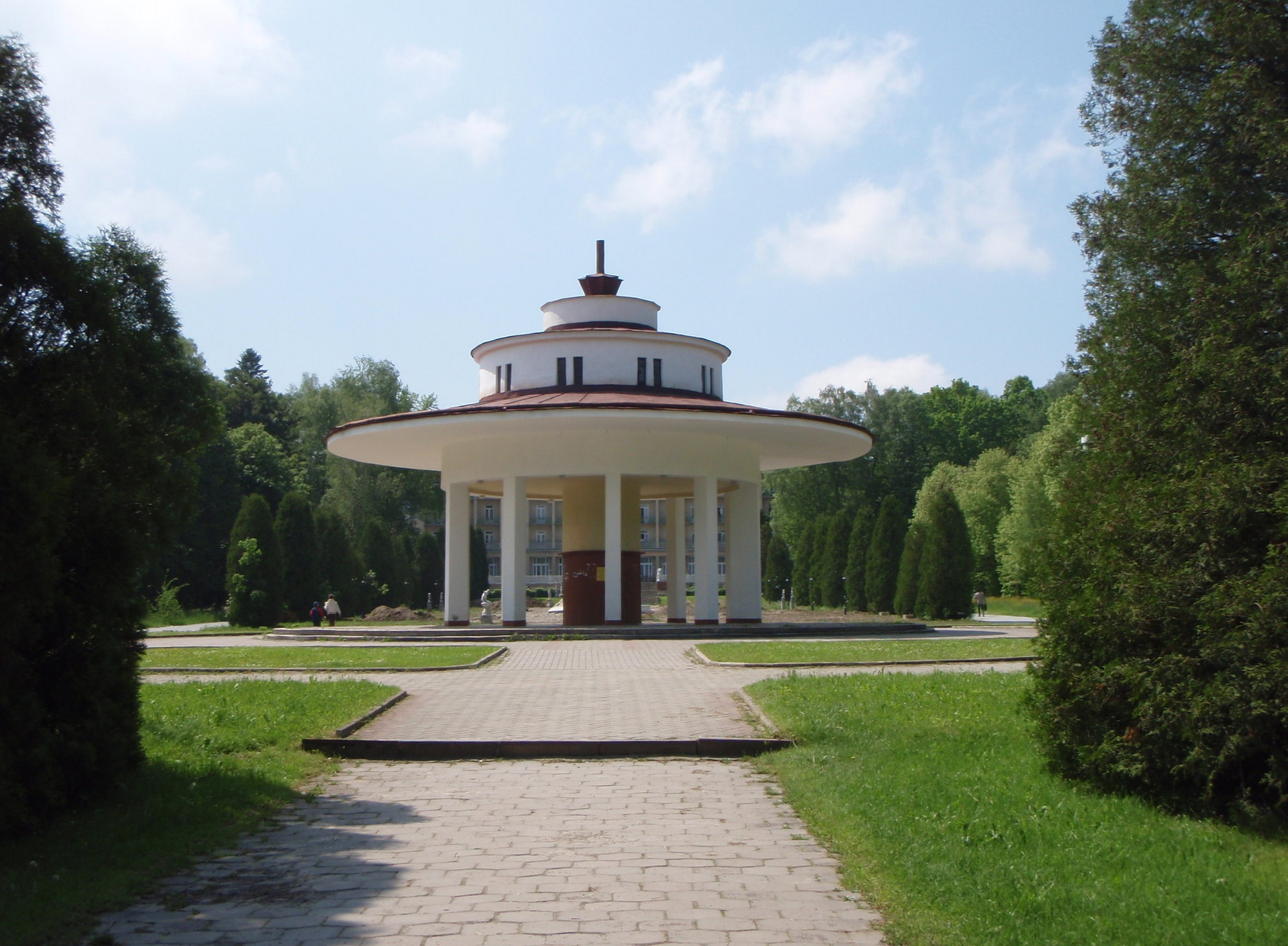 Старий бювет мінеральних вод в місті Моршин (Україна, Львівська область)